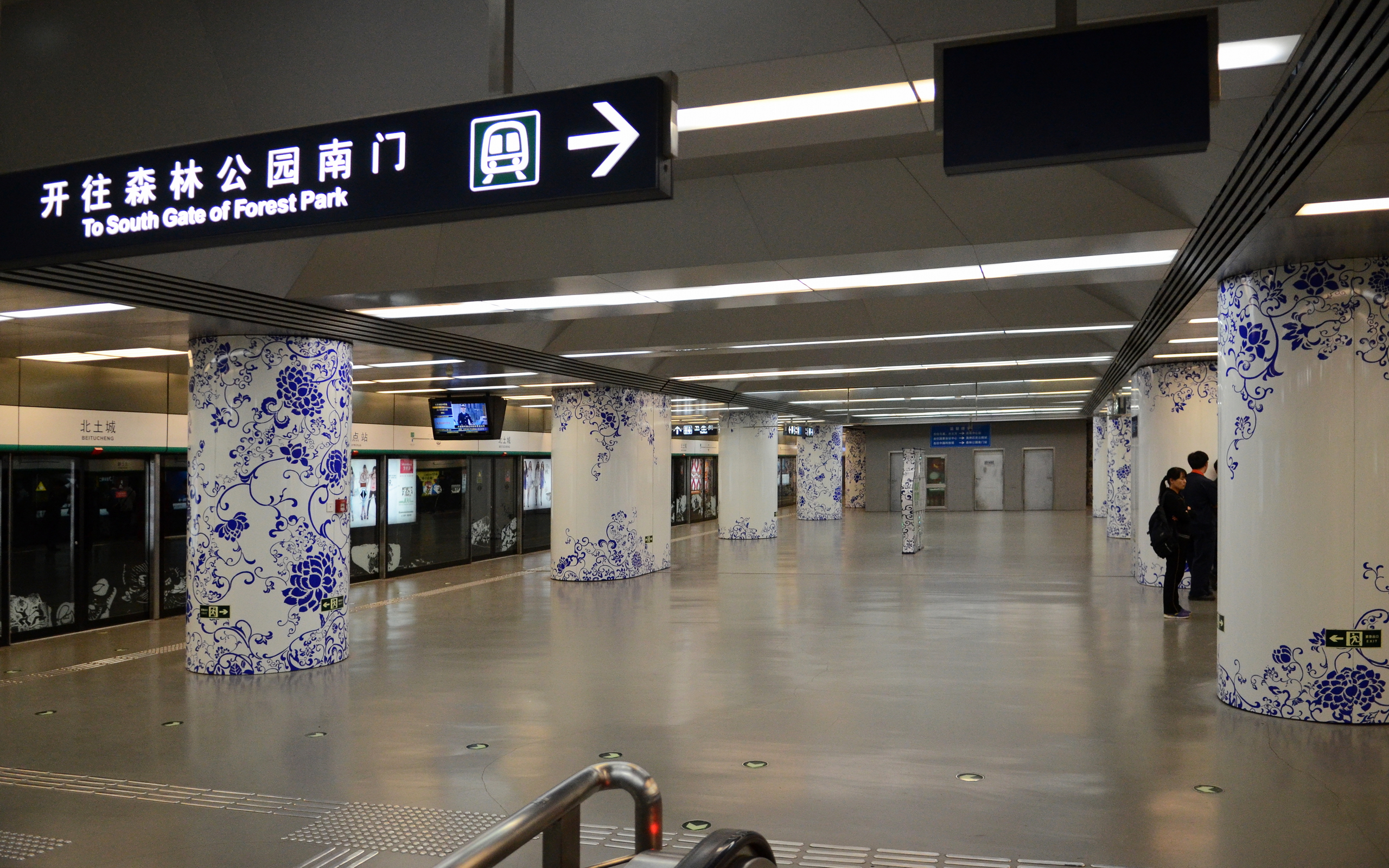 中文（中国大陆）: 8号线北土城站站台